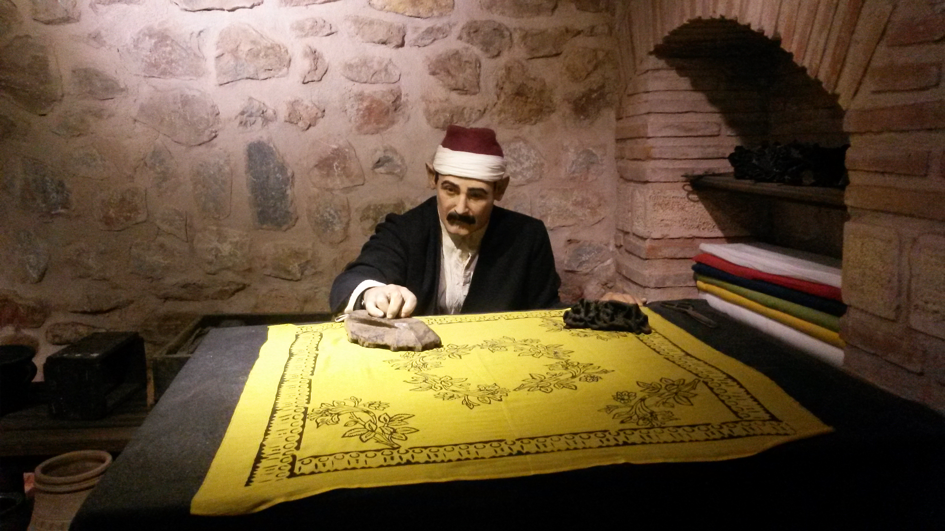 Fotoğrafta ıhlamur ağacından yapılan kalıplar kullanarak el baskı tekniğini uygulayan bir usta canlandırılmaktadır.